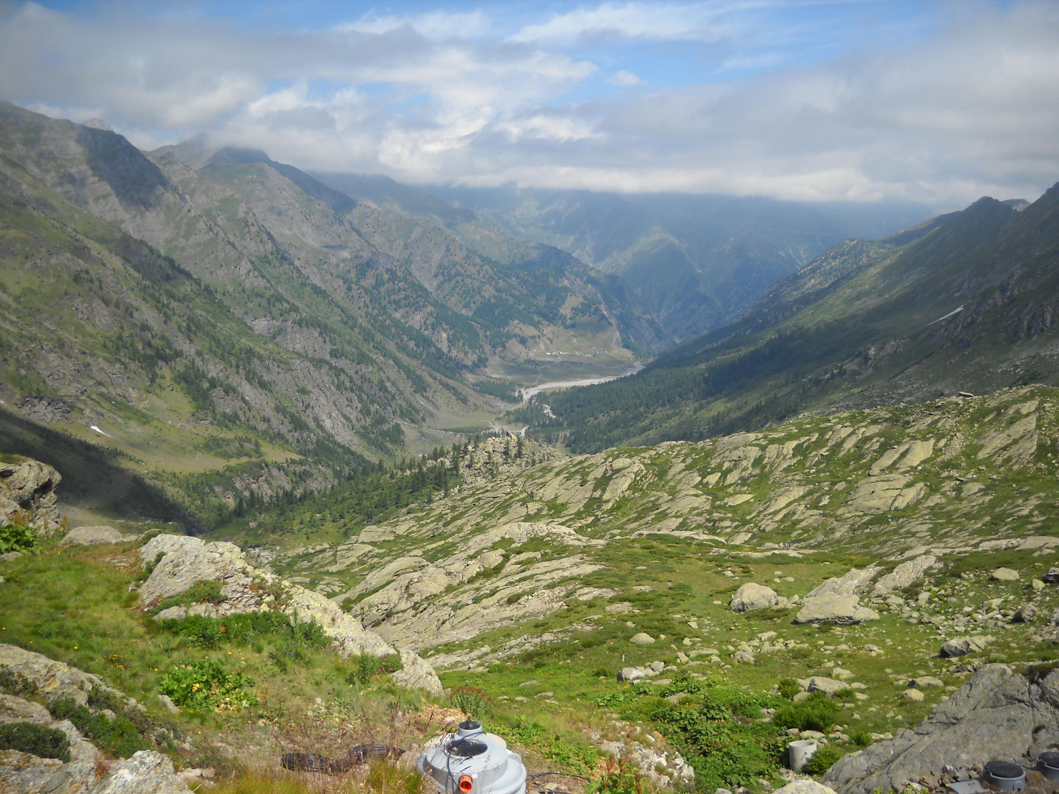 Dal rifugio Granero Pra Miraflores